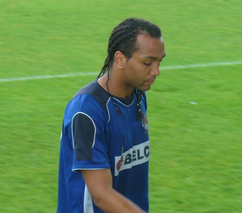 Emilio Nsue en Zubieta